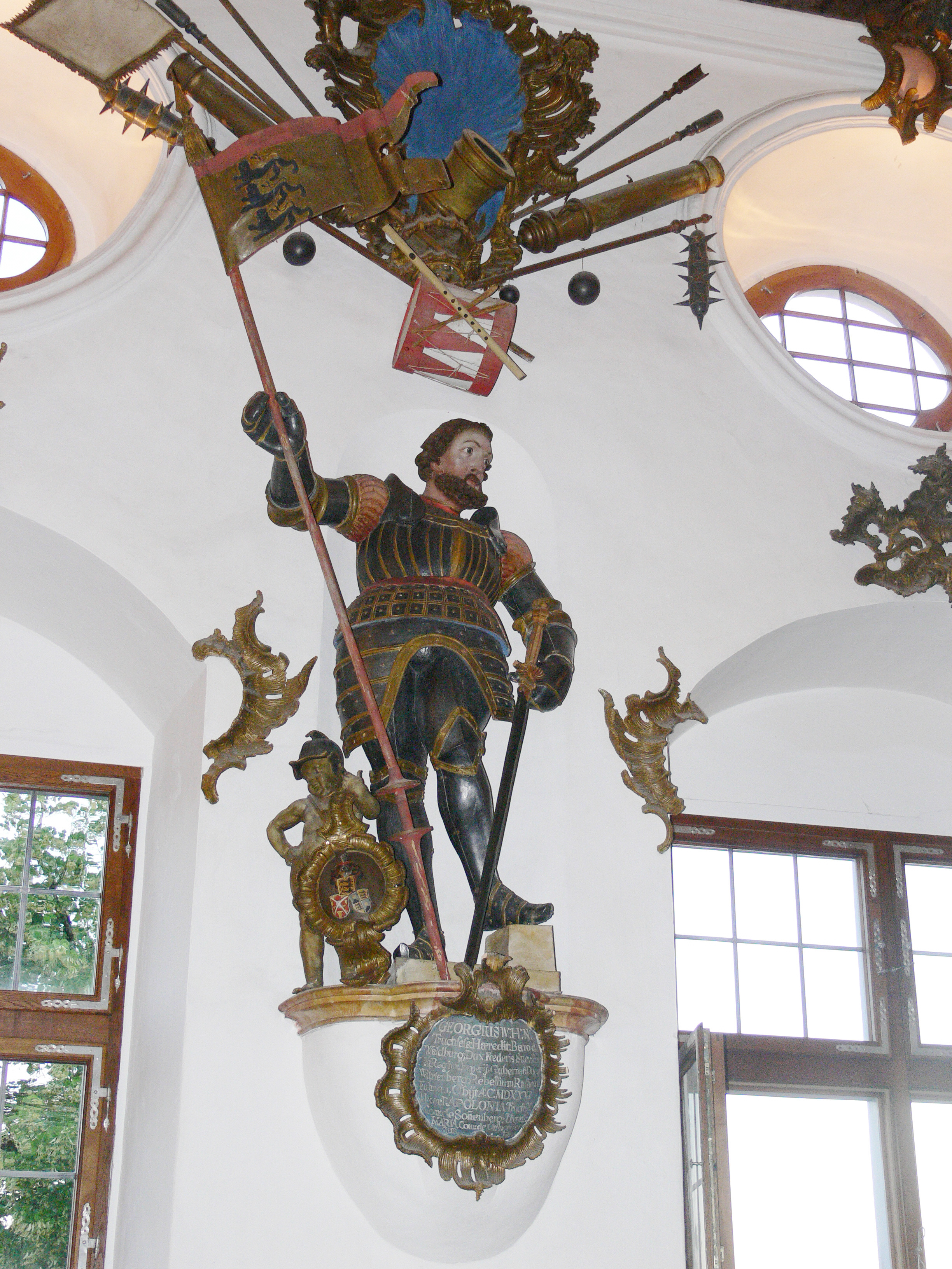 Schloss Wolfegg, Wolfegg, Landkreis Ravensburg, Baden-Württemberg Rittersaal, Staute des Truchsessen "Georgius IV." ( =Georg III., so genannter „Bauernjörg“)